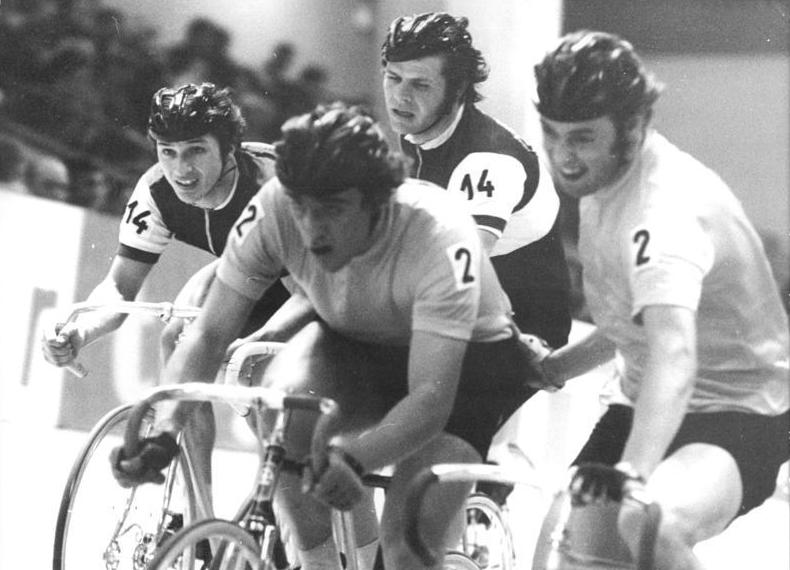 D. Stein, H. Bartels, G. Mortag, M. Wiegand ADN-ZB Mittelstädt 6.1.77-str-Berlin: 6 Tage um den Preis der Junge Welt auf der Winterbahn - Mit einer großartigen Leistung warteten die jungen TSC-Fahrer Dieter Stein (l.) und Horst Bartels (M-Nr. 14) am dritten TAg dieser Renn-Woche auf. Dank einer überlegen gestalteten zweiten REnnphase konnten sie nach 450 Runden mit 39 Punkten als klare Sieger gefeiert werden. In der Gesamtwertung führen aber Gerald Mortag (Wismut Gera-M. vorn) - Mathias Wiegand (SCK-r.) weiter.